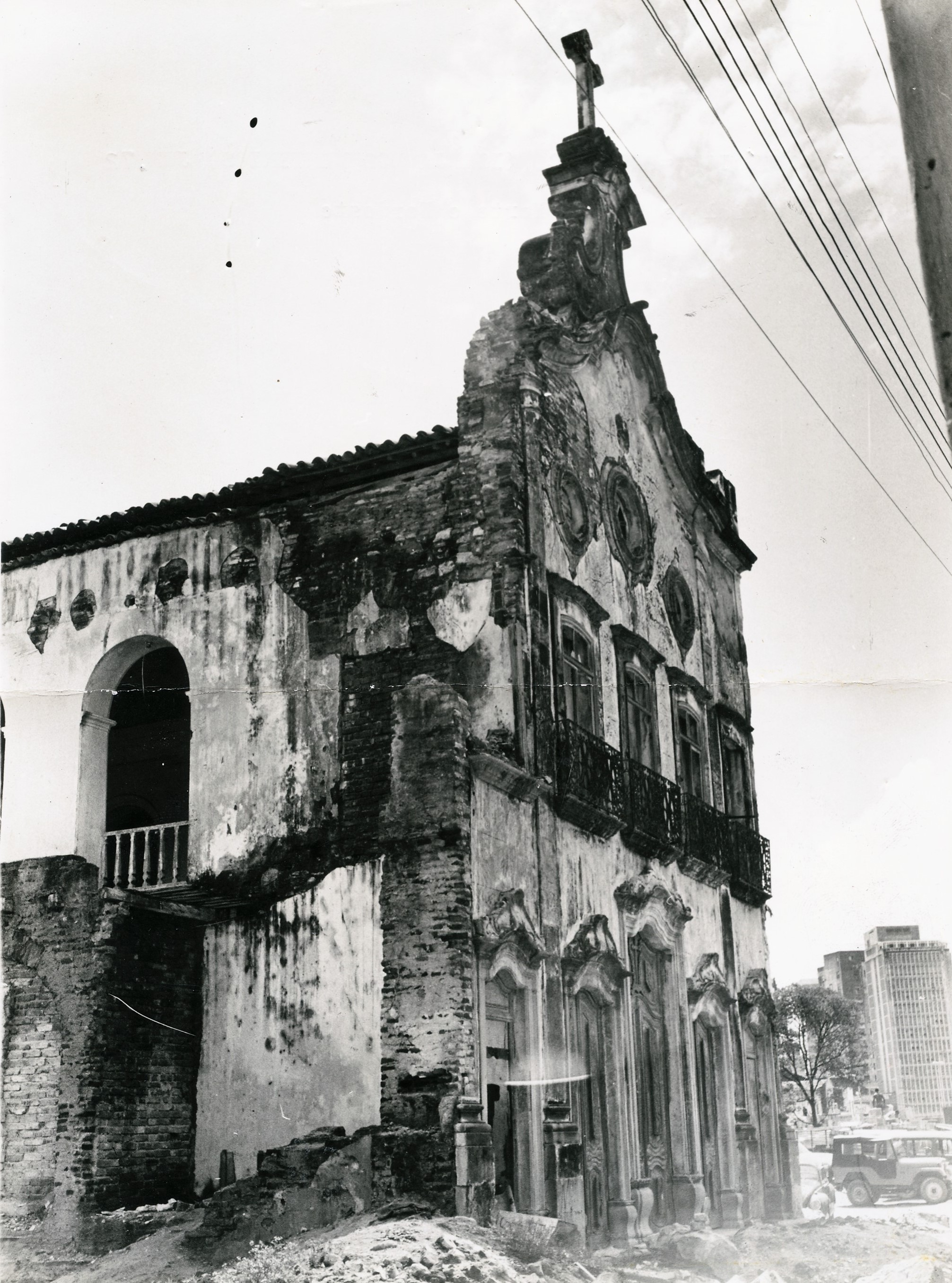 Fotografia do Fundo Correio da Manhã, sob a guarda do Arquivo Nacional.